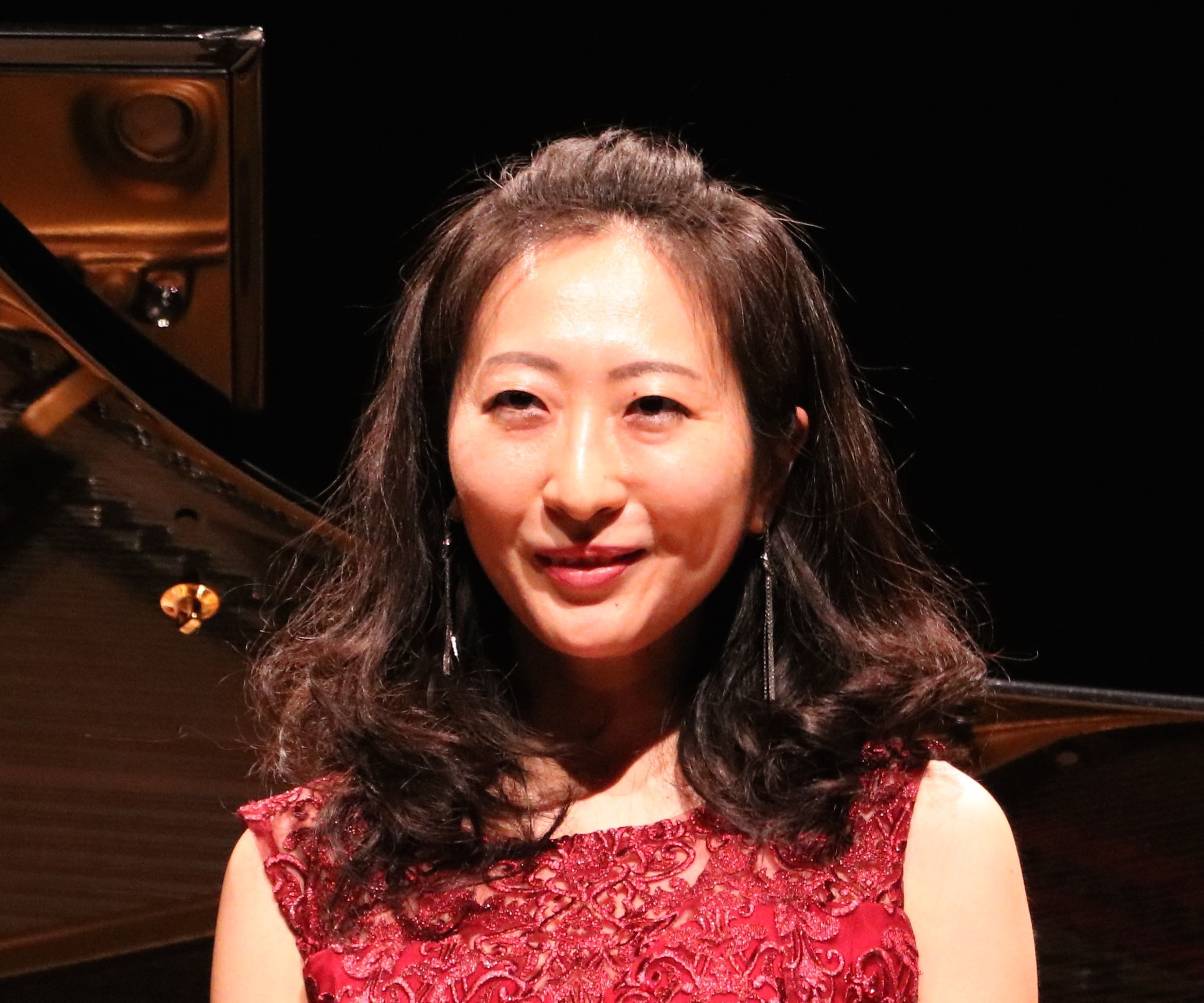 Etsuko Hirose à La Folle Journée 2018 à Nantes (portrait)